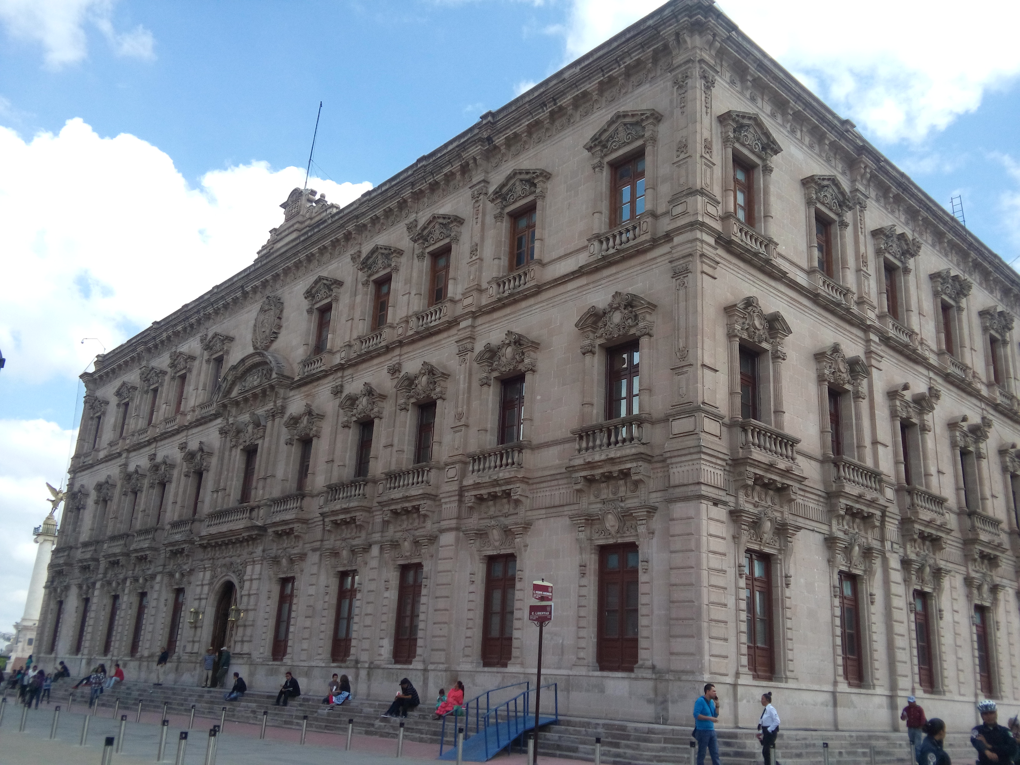 Sede del poder ejecutivo de la entidad